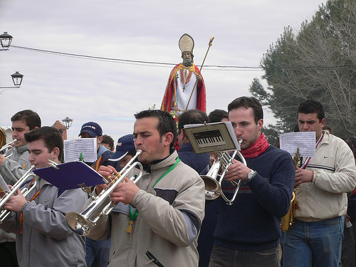 El fliscorno es un instrumento de viento-metal muy similar a la trompeta pero con un tamaño algo mayor y con un sonido ligeramente mas grave y dulce.